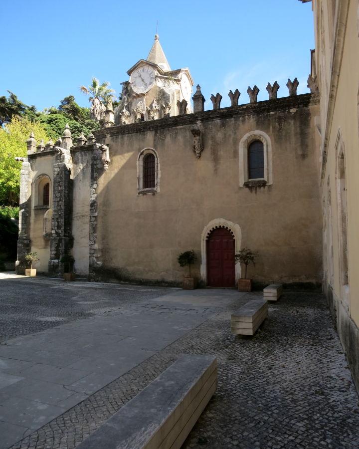 Igreja de Nossa Senhora do Pópulo, Caldas da Rainha